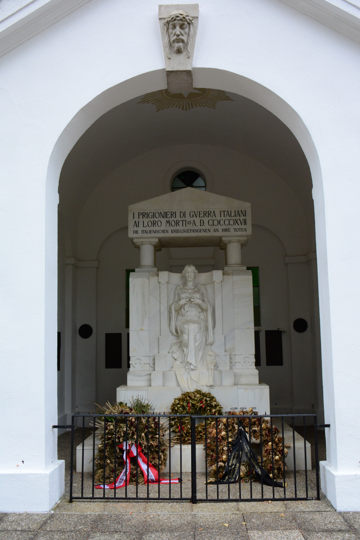 Der Soldatenfriedhof Sigmundsherberg war Bestandteil des Kriegsgefangenenlagers Sigmundsherberg in Niederösterreich - Friedhofskapelle